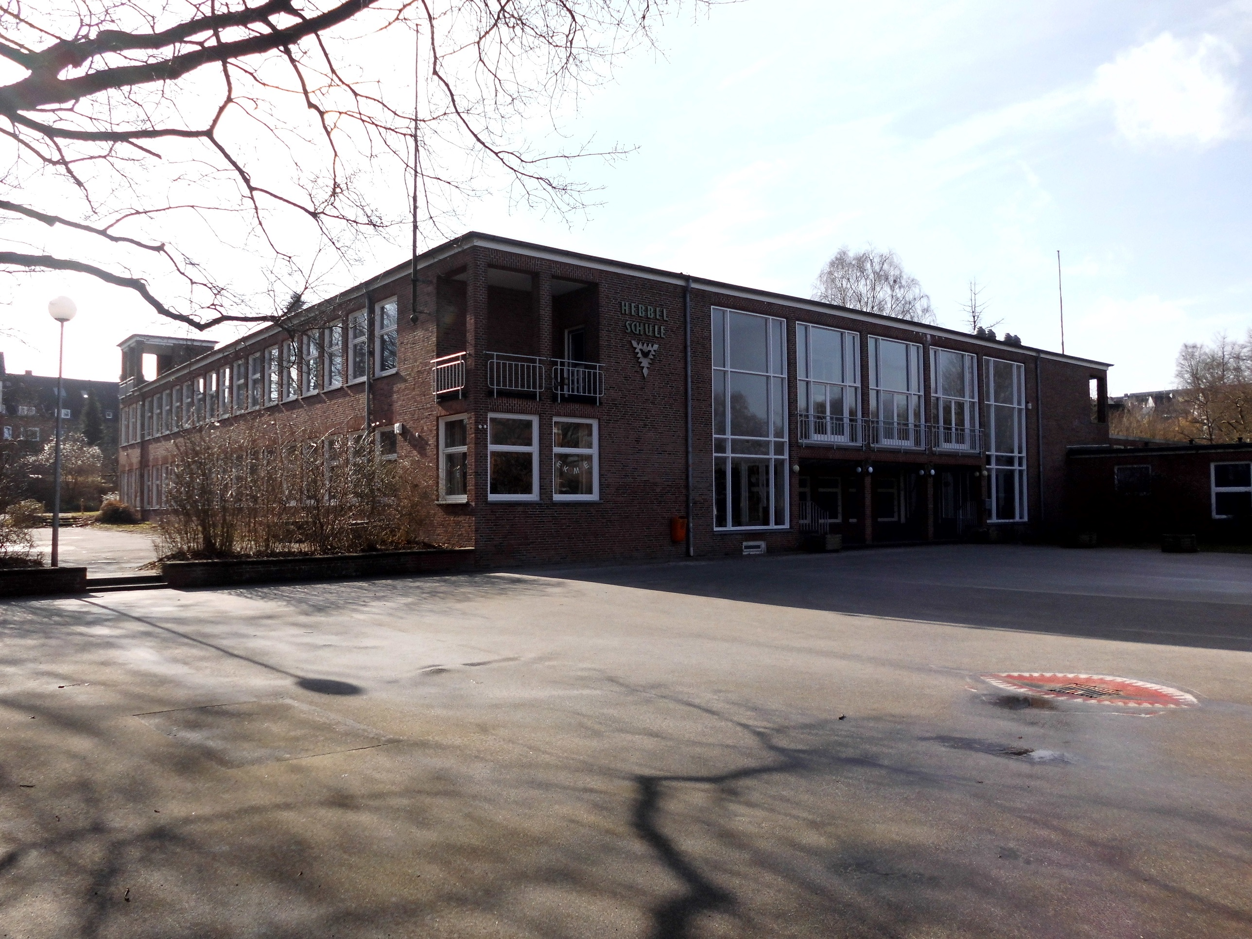 Hebbelschule in der Feldstraße 177 im Kieler Stadtteil Wik.